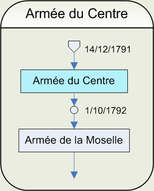 Ordinogramme de l'armée du Centre Dessin réalisé par Papier K